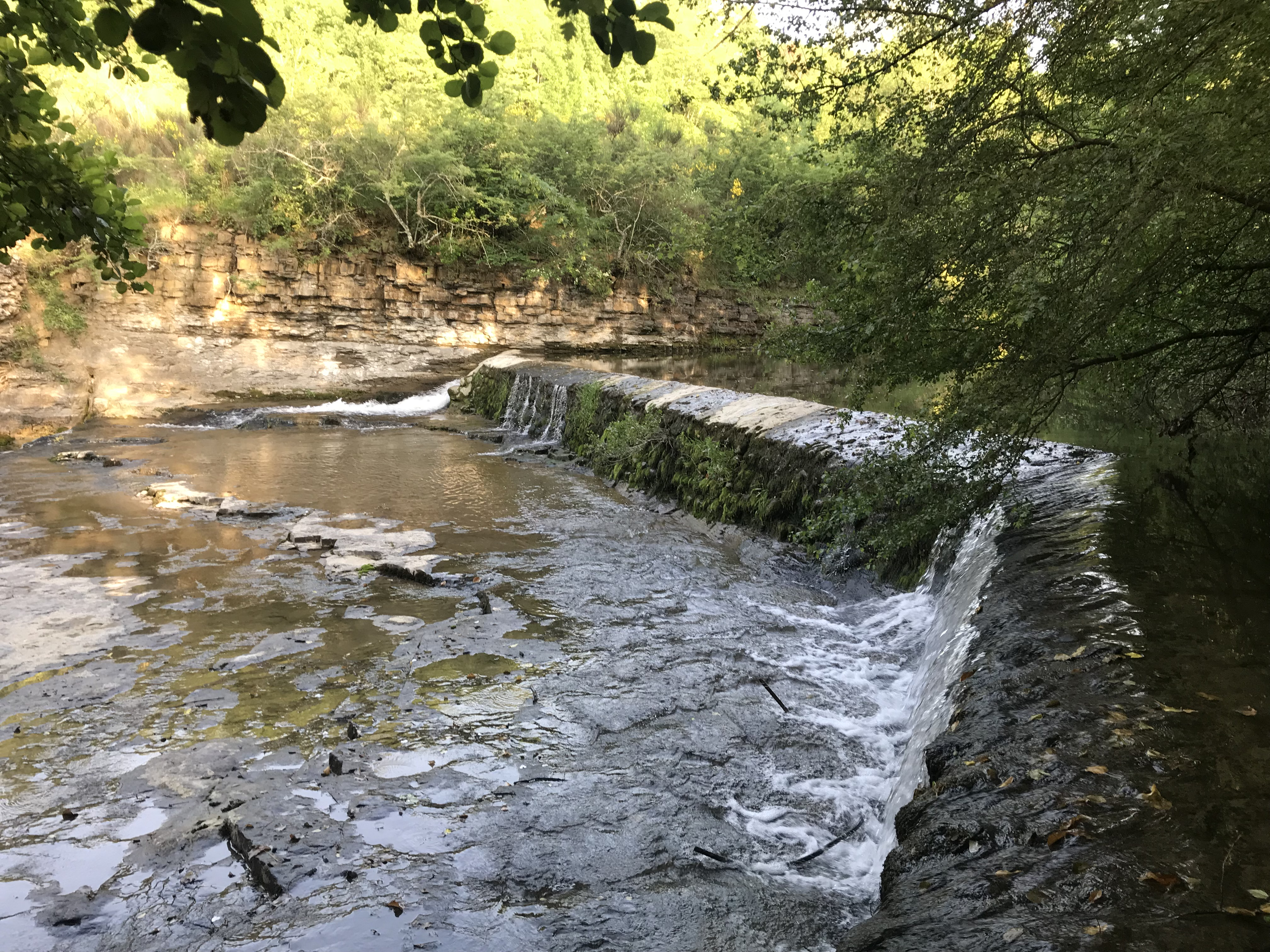 Rvivière de l'Ouvèze (Ardèche) à Privas.